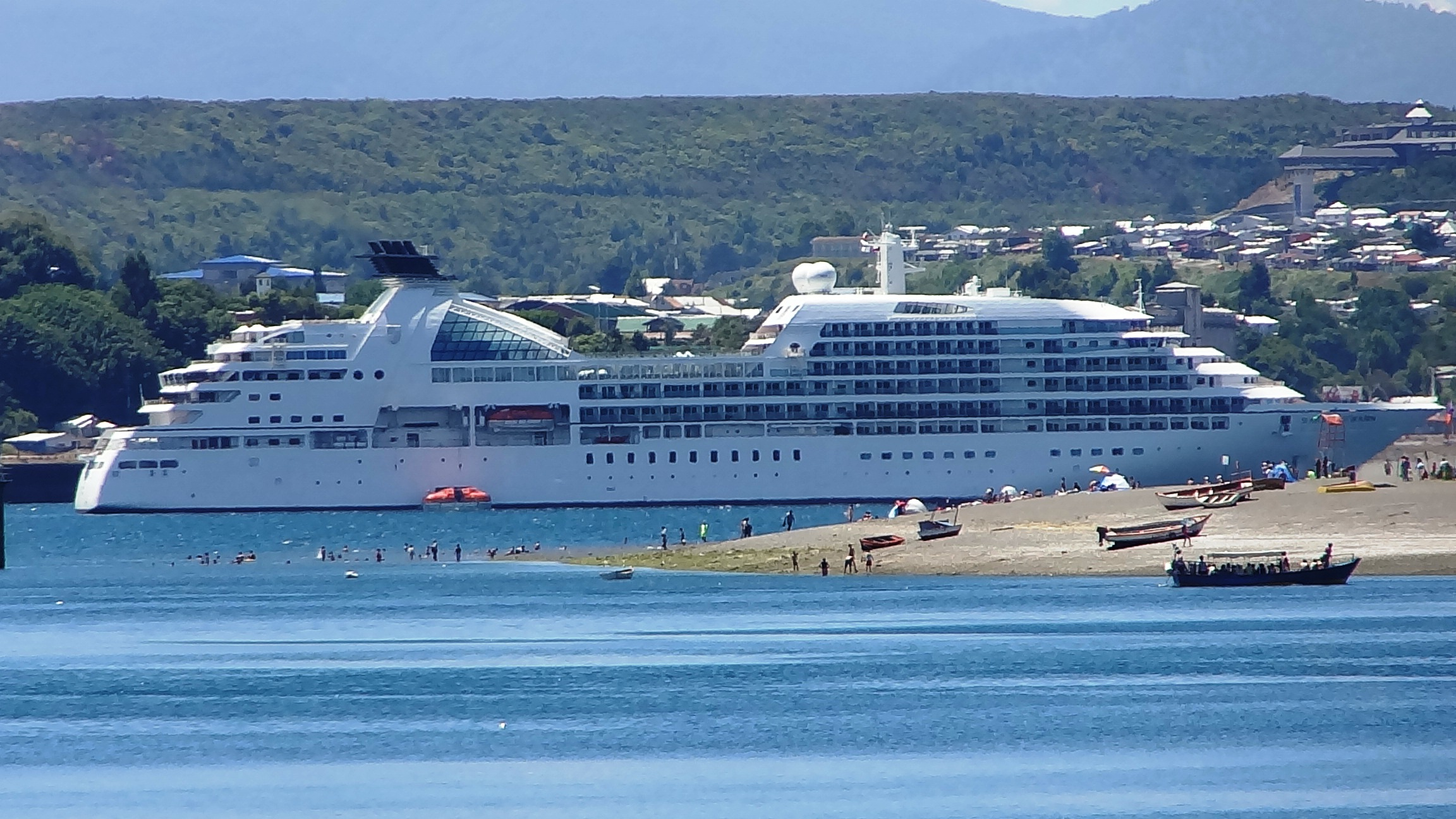 Crucero en el verano en la Bahía de Puerto Montt